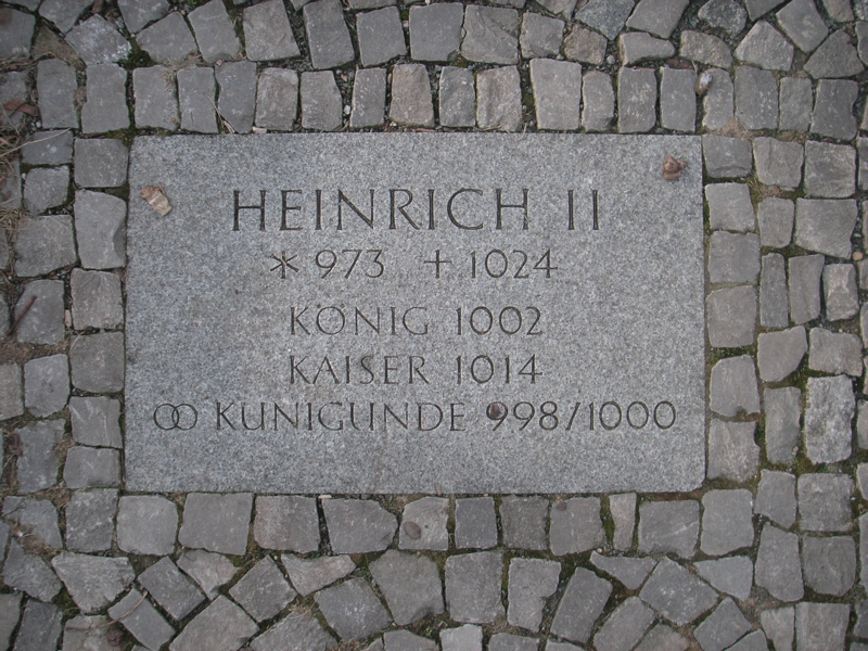 Der Weg der Ottonen: Heinrich II Fotografiert am Magdeburger Domplatz.